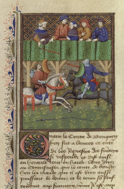 Joute de Vannes (1381 ap. J.-C.) dans les Chroniques de Jean Froissart - XIV -XVe siècle